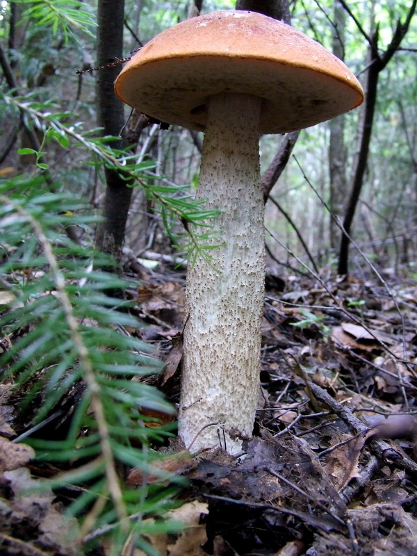 Leccinum aurantiacum. Karmėlava forest, Lithuania.